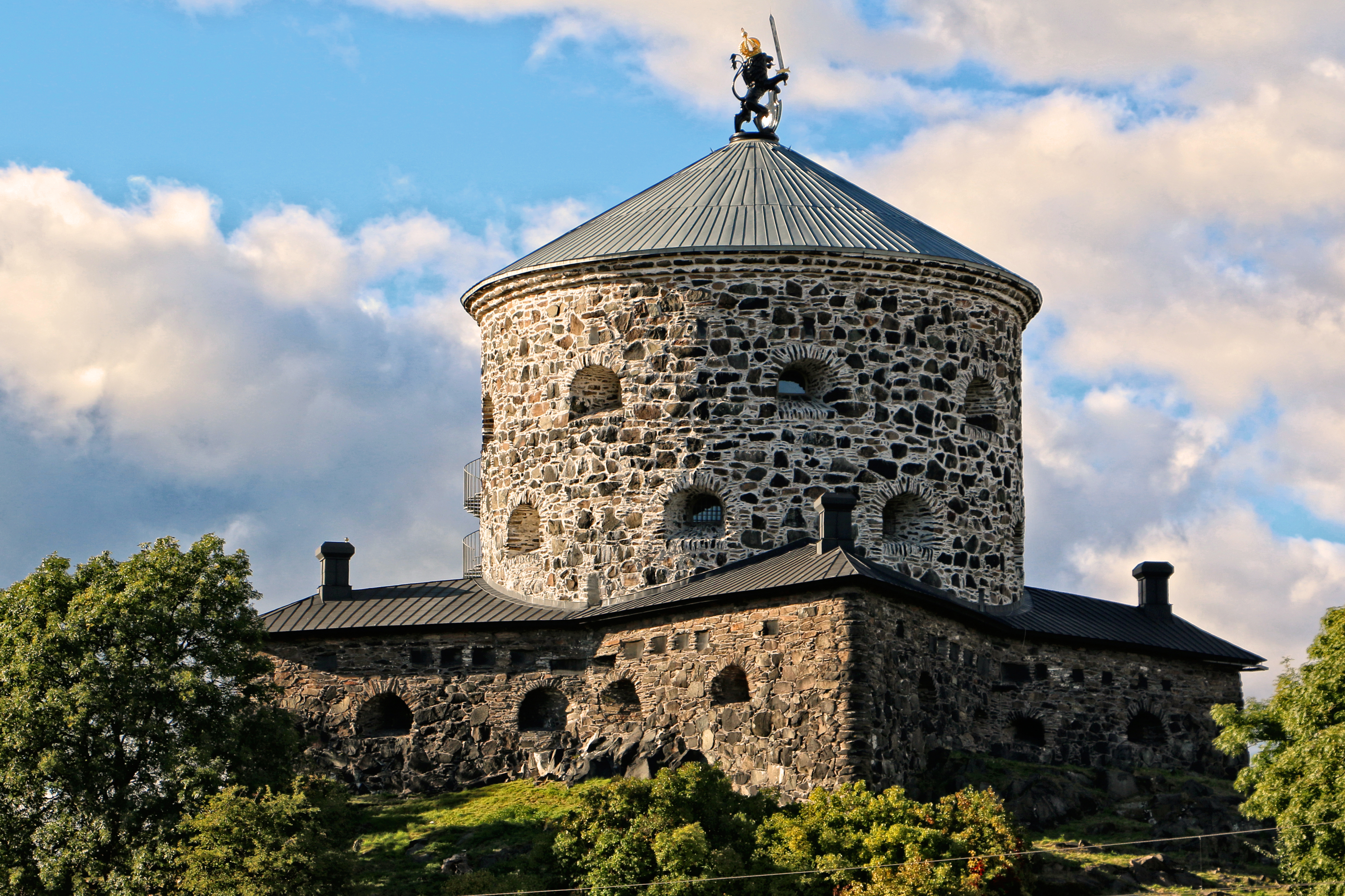 Göteborg, Skansen Lejonet